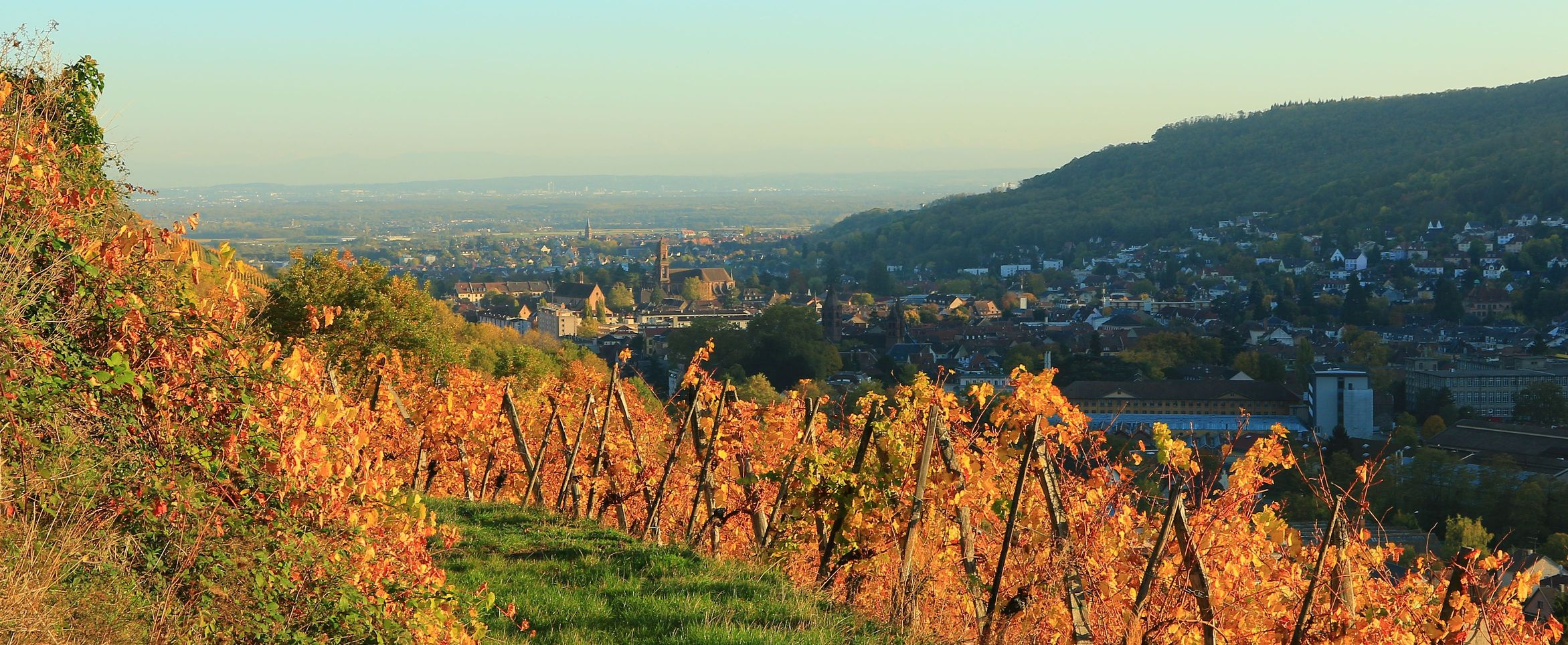 Vue depuis le vignoble, en direction de Mulhouse.